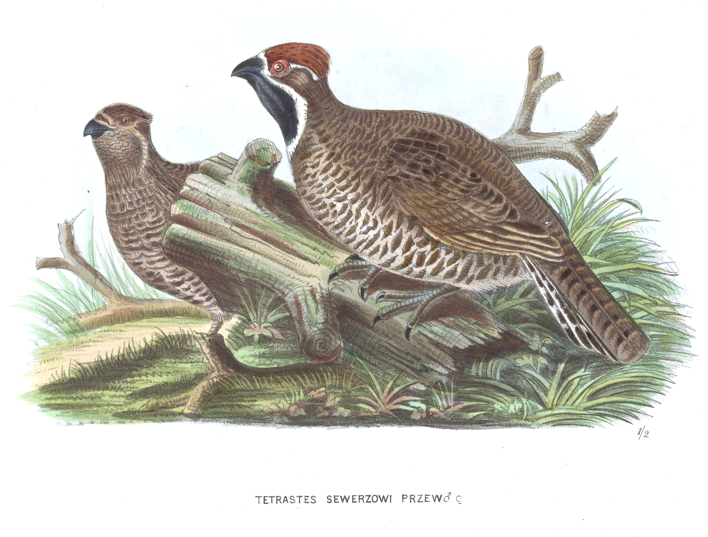 Tetrastes sewerzowi